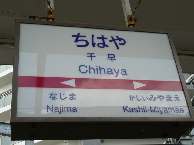 西鉄千早駅（西鉄貝塚線 福岡市、日本）の駅名標。「千早」とのみ記されている。